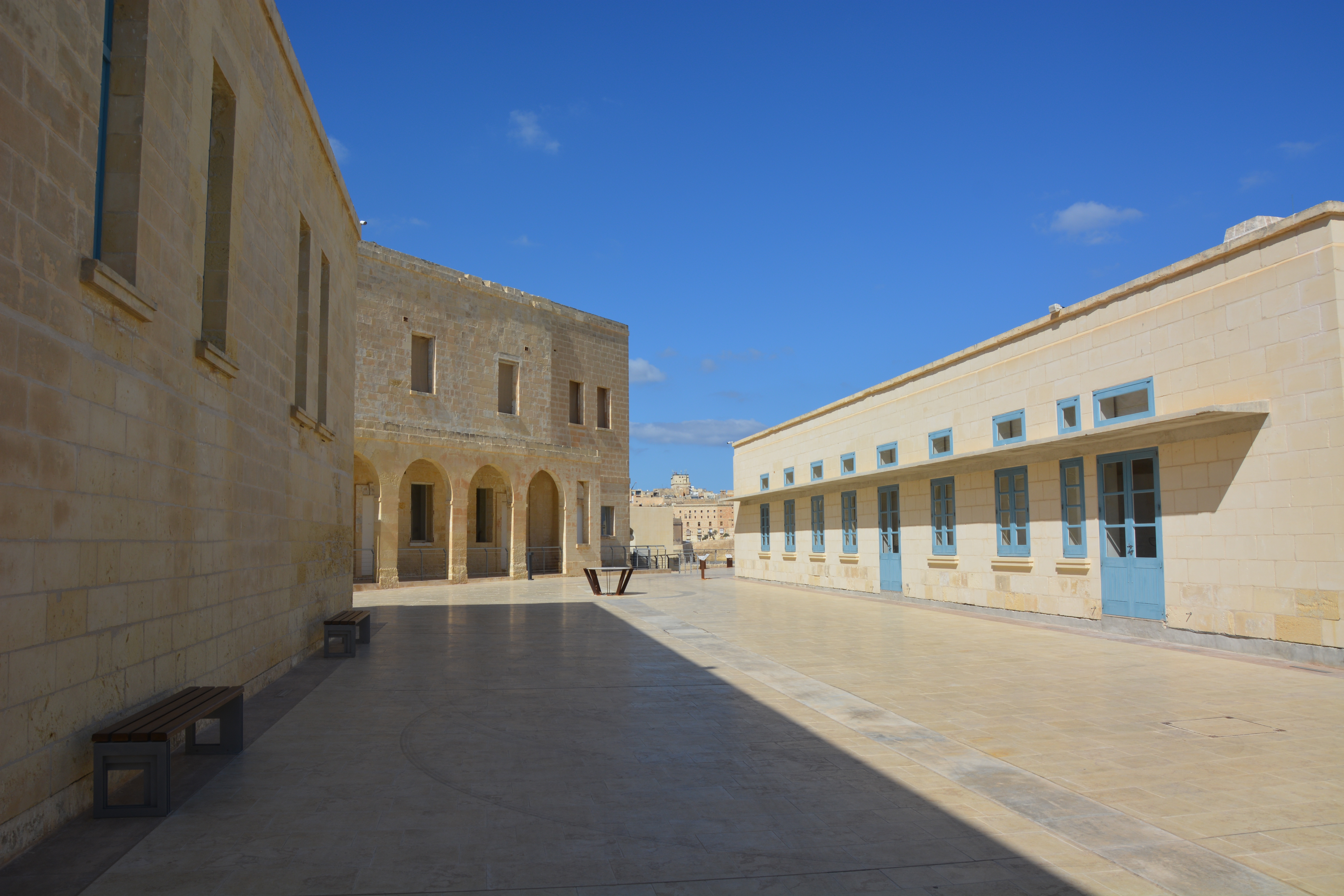 Vue intérieure du Fort Saint Ange, Birgu, Malte